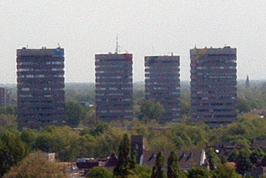 Eigen foto, genomen vanaf de Martinitoren, van de gebouwen van de IB-Groep in Groningen.